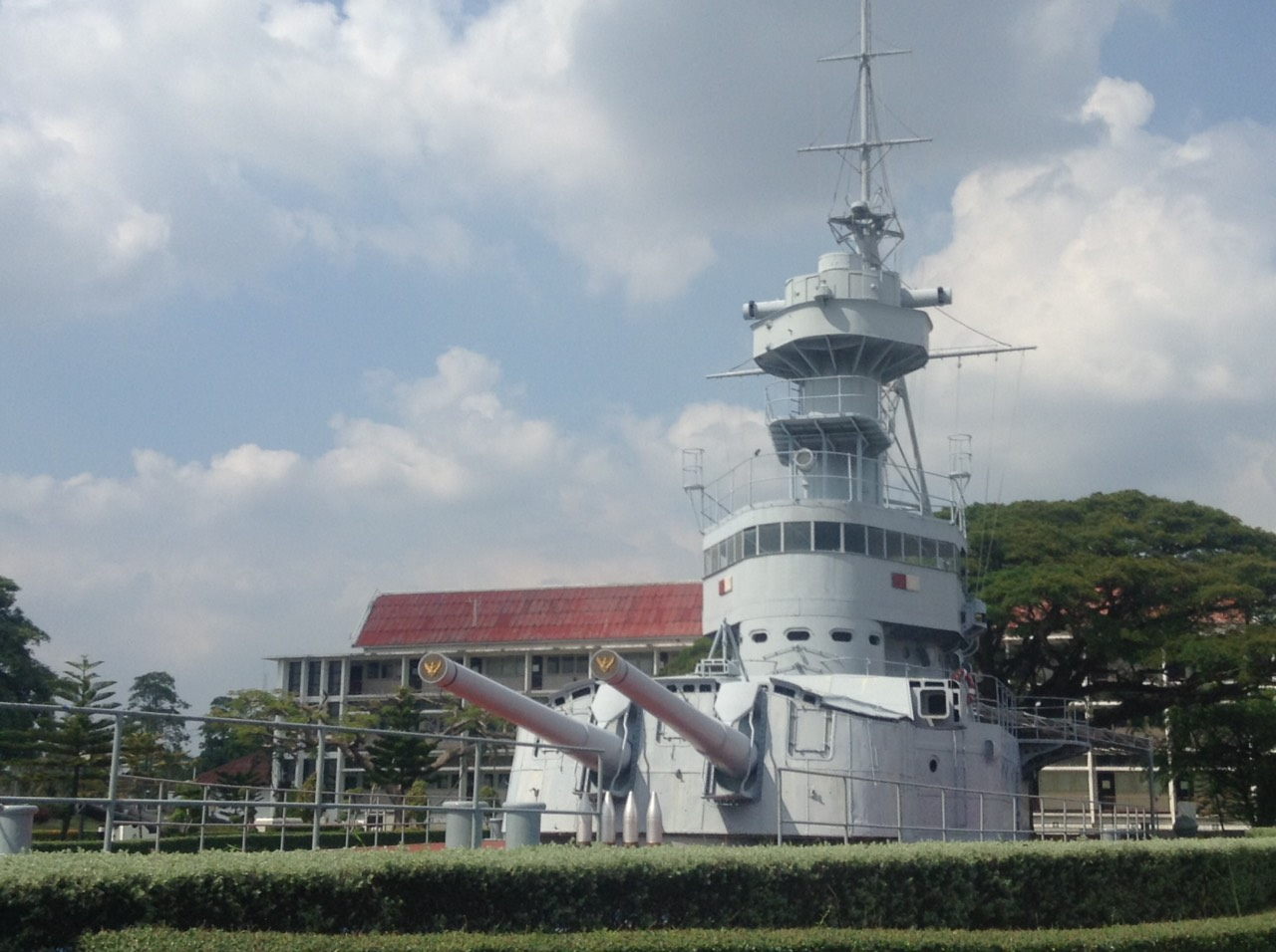 บริเวณริมแม่น้ำของโรงเรียนนายเรือ